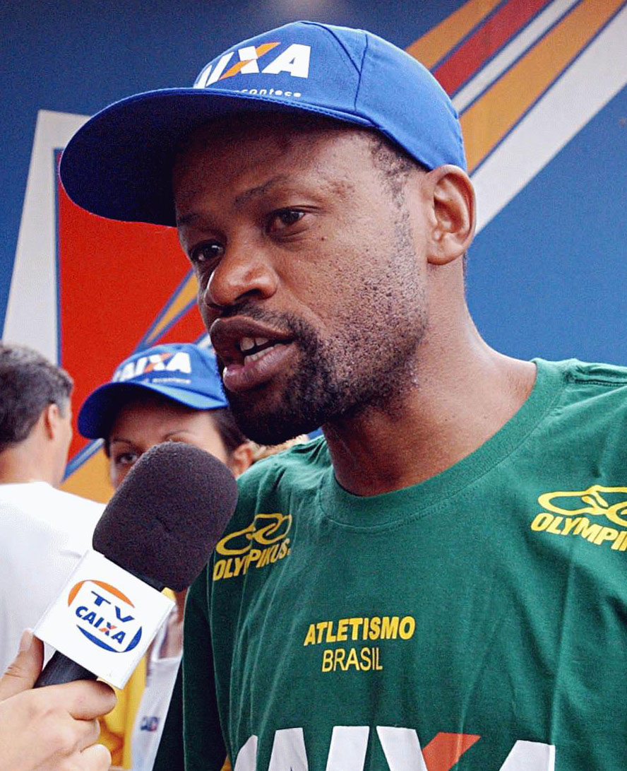 Atleta campeão Zequinha Barboza faz o aquecimento dos corredores da Primeira Corrida dos Economiários.